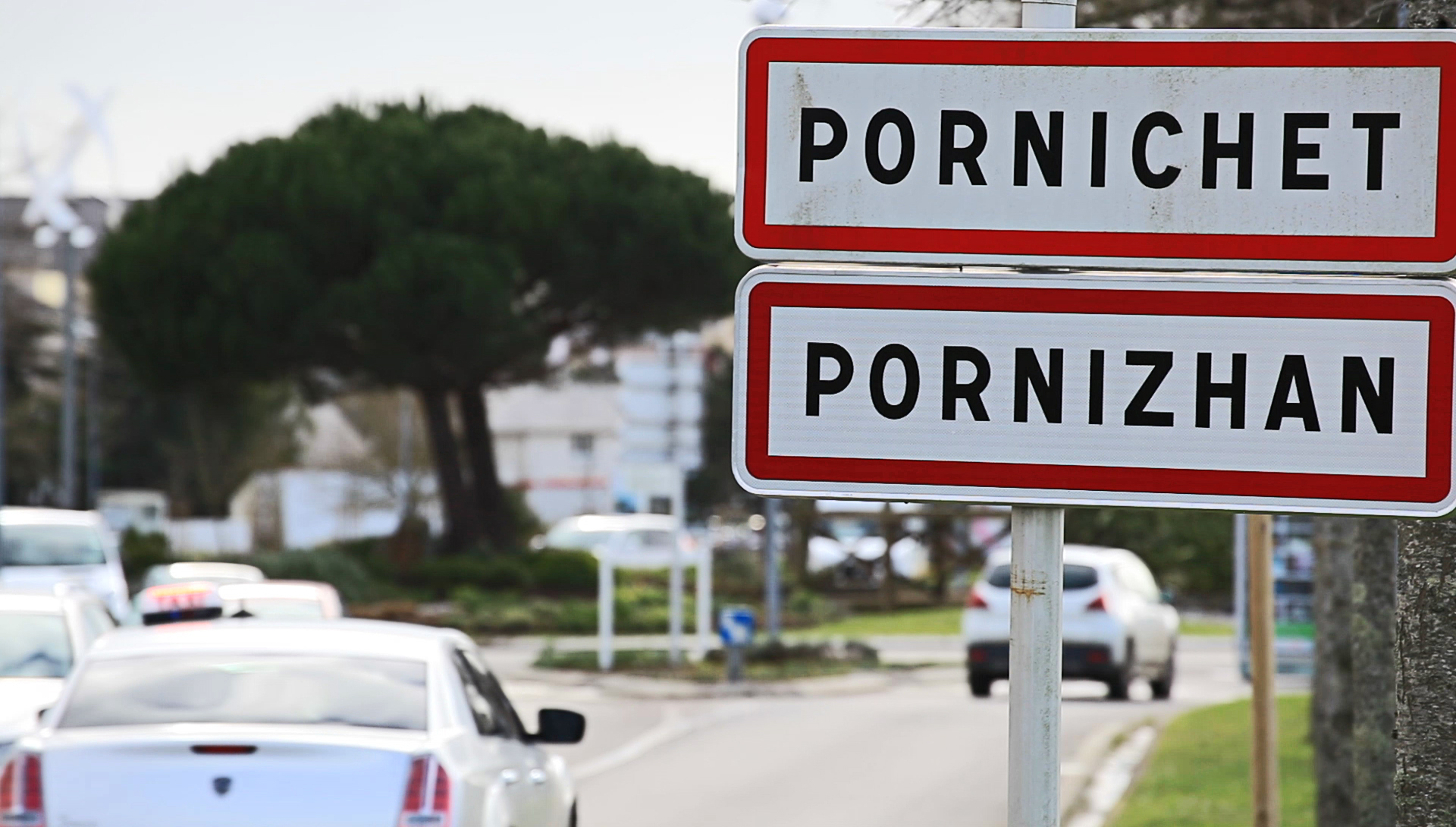 Entrée de ville de Pornichet